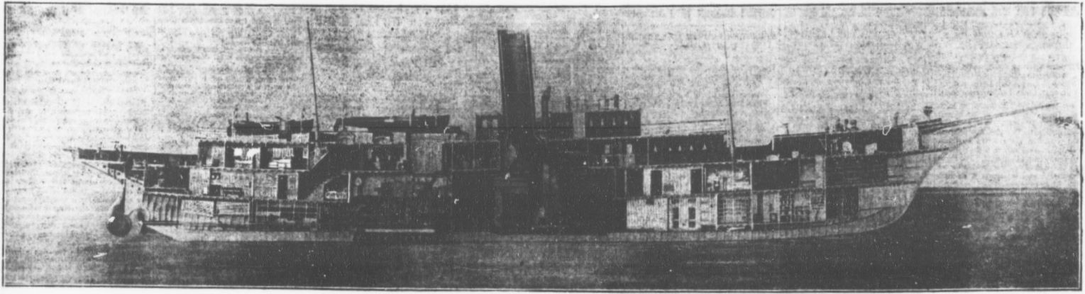 Modell der Luxusyacht TS Vanadis (gebaut 1908), hergestellt 1910 im Auftrag des Eigentümers C.K.G. Billings (Länge des Modells ca. 1,80 m)